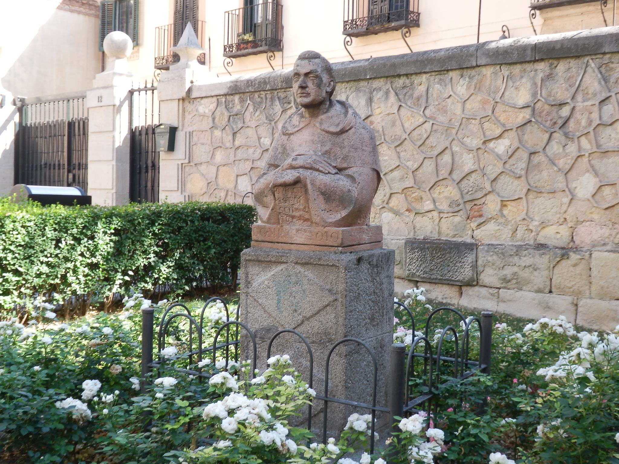 Escultura de Domingo de Soto en Segovia (España); cosmólogo, físico y matemático español, fue precursor de la Física Moderna. Nació en Segovia (España) en 1494 y fue además teólogo perteneciente a la orden de los Dominicos.